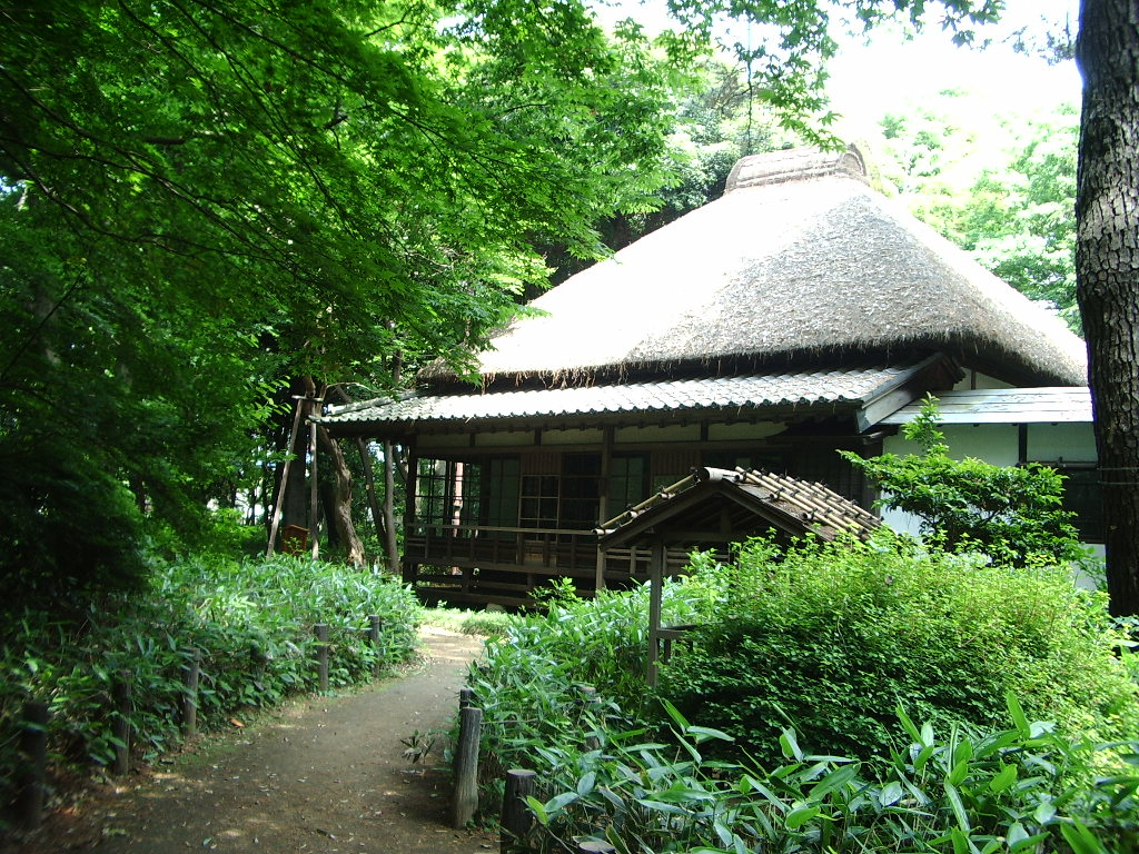 都立蘆花恒春園